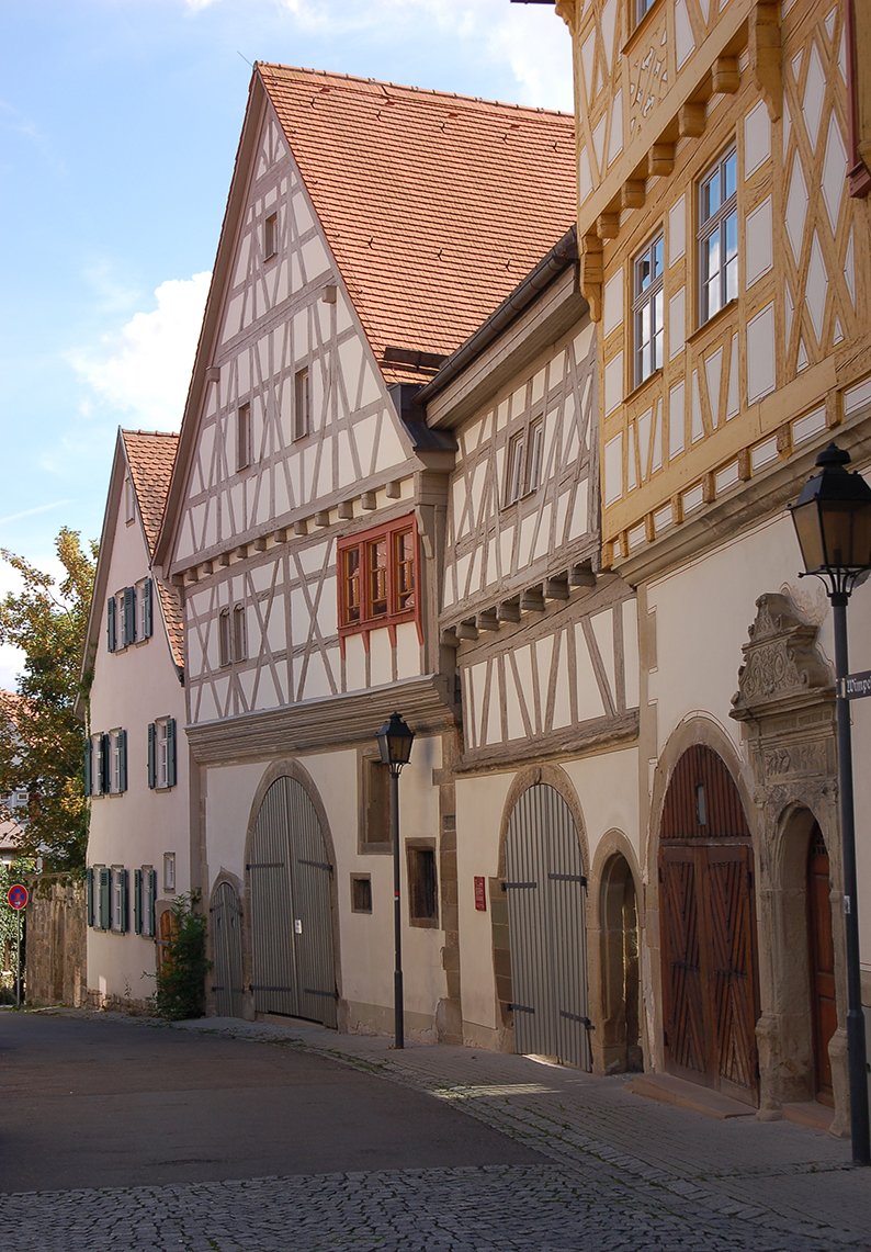 Wimpelinhof in Markgröningen (Ostfassade von Nordost). Links: Ehemalige Scheune, heute Stadtarchiv, mit farblich abgesetztem Fenstererker